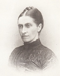 Amalia Raiffeisen